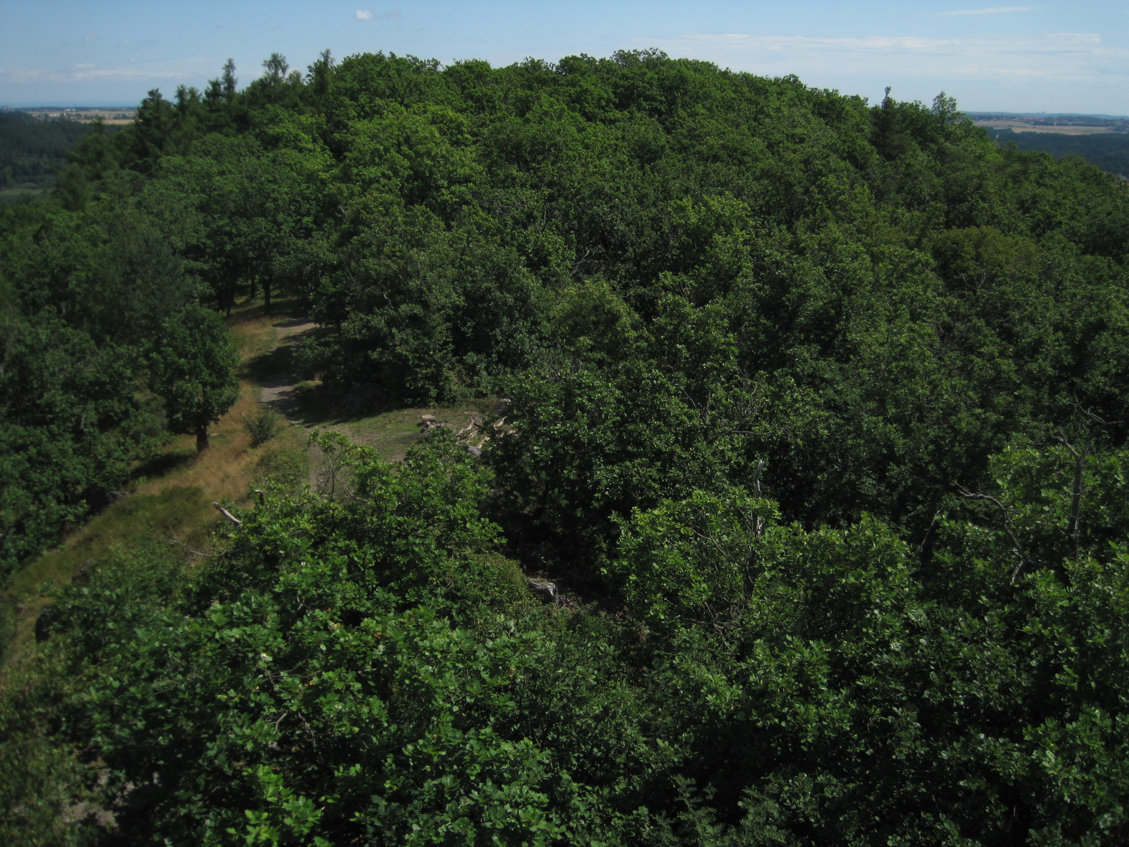 Hradiště na Vysokém vrchu, na zalesněné náhorní plošině Vysokého vrchu (486 m) západně od obce, Malé Kyšice.